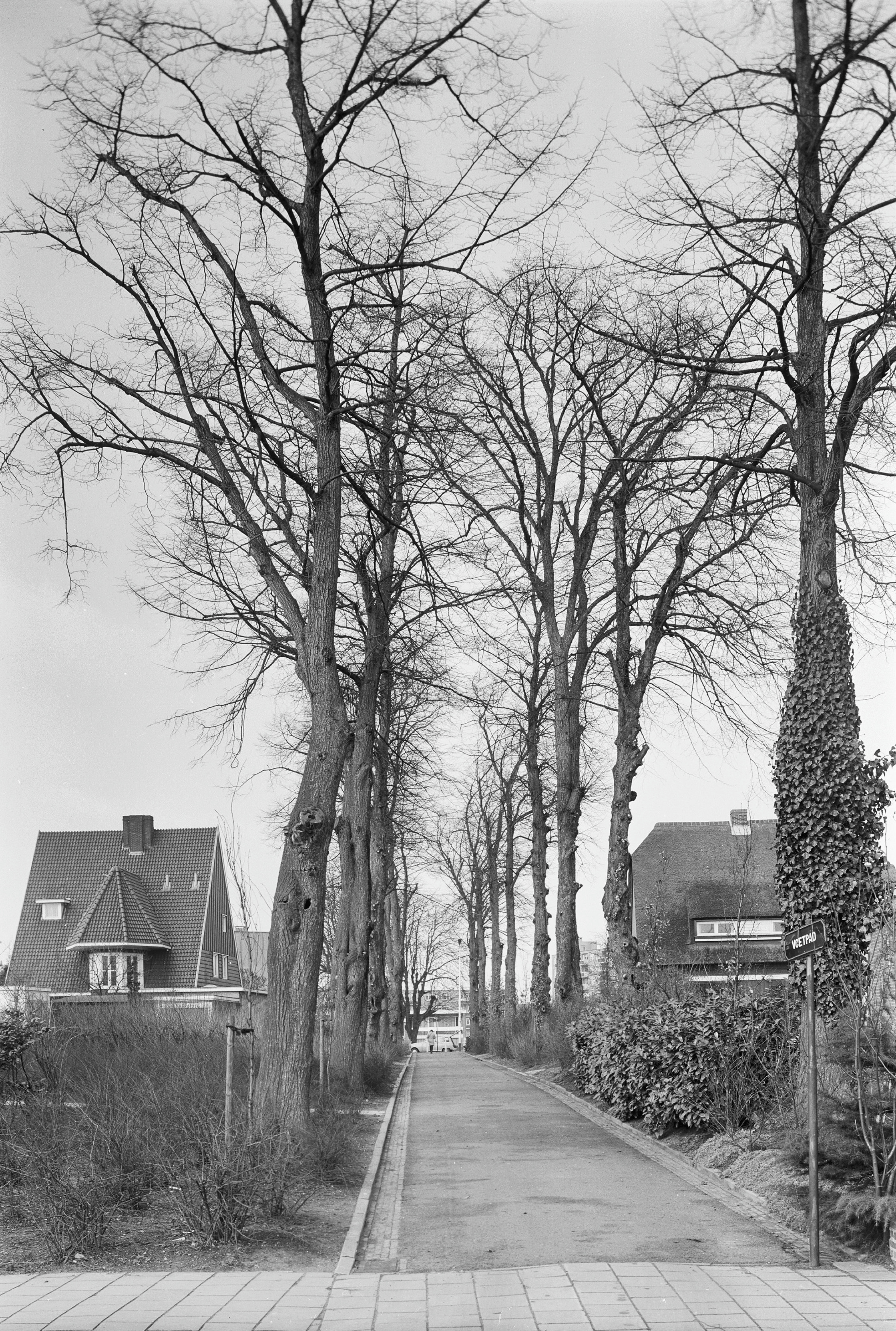 Lindenlaantje, overzicht